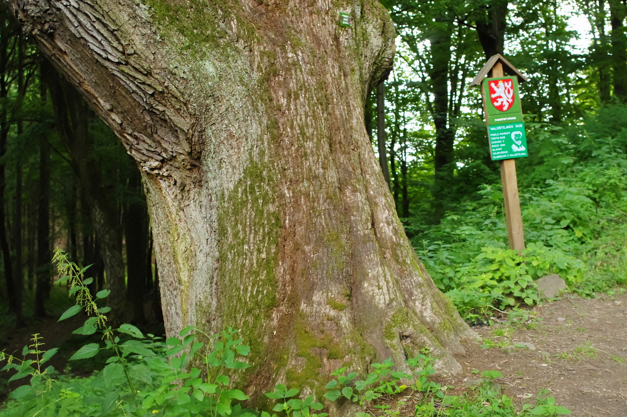 Valdštejnův dub